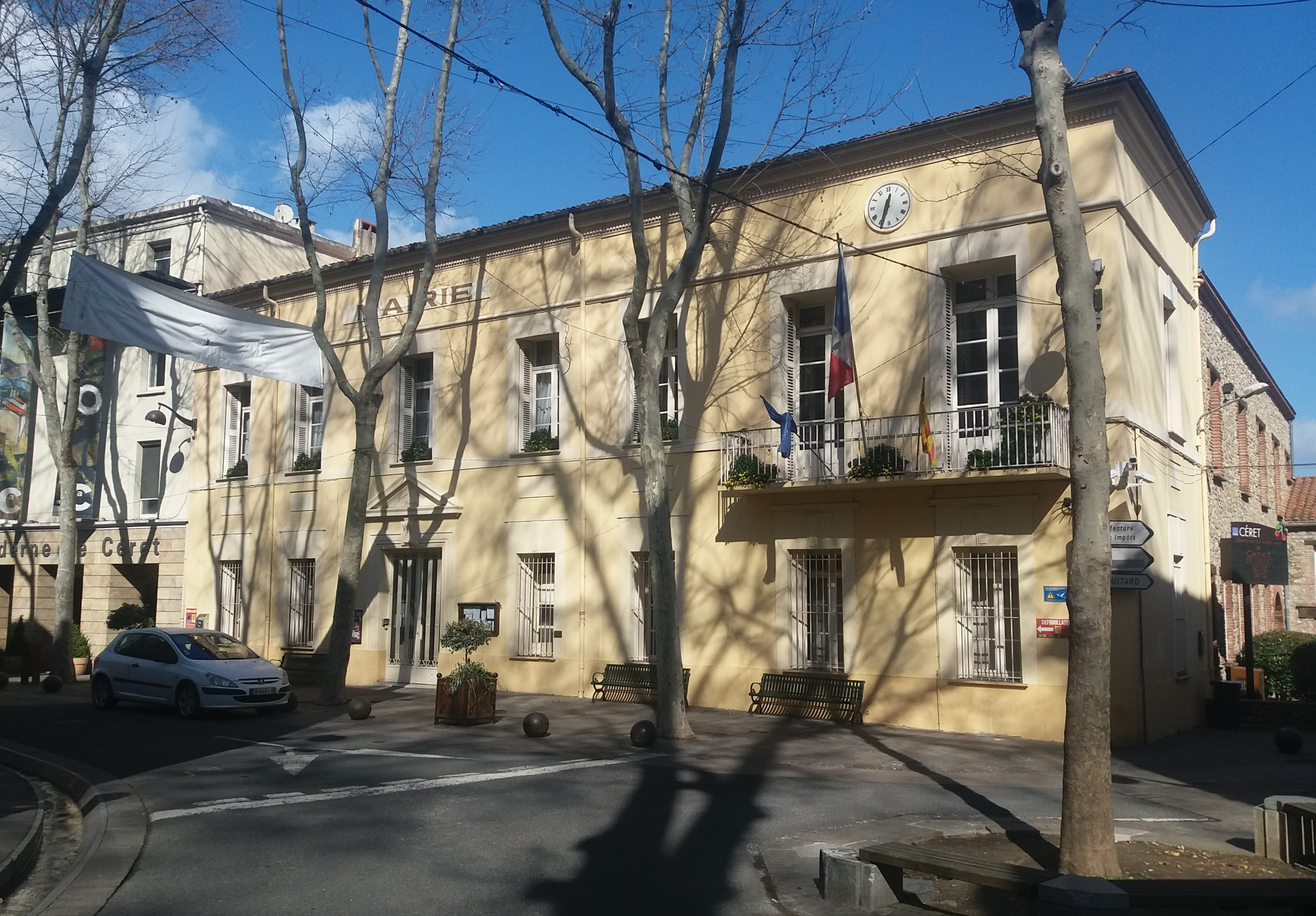 La Casa del Comú de Ceret